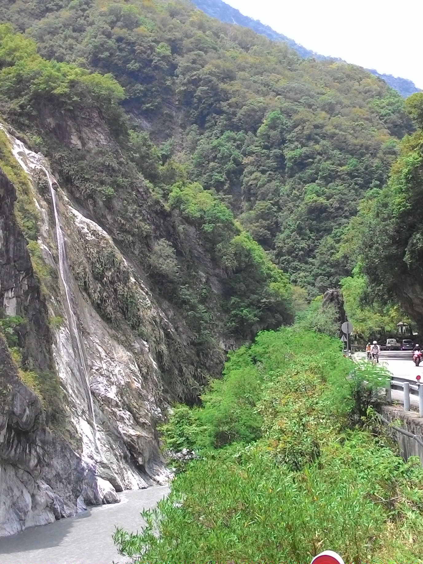 於中橫遠眺綠水瀑布